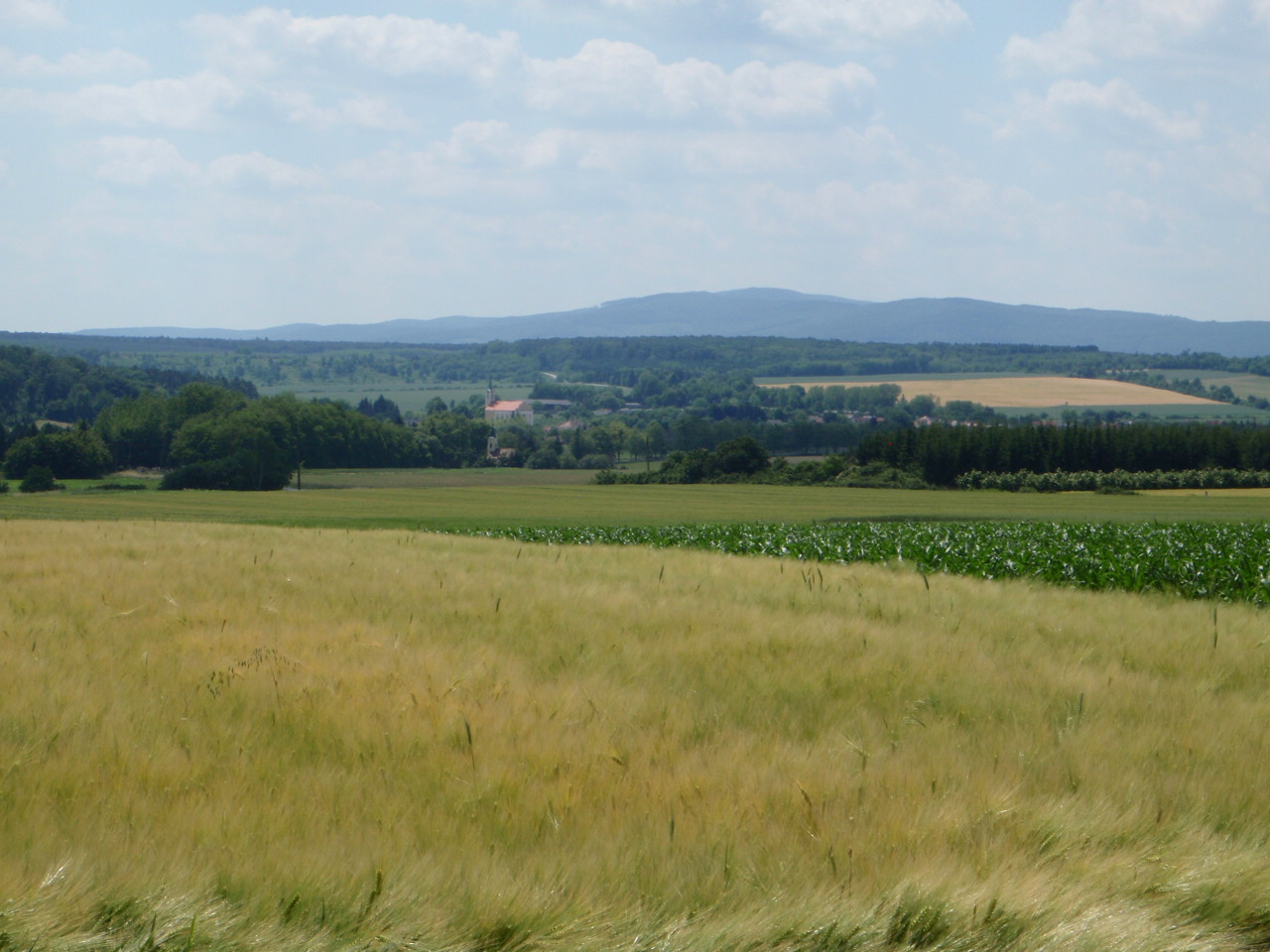 Horvátzsidány látképe Peresznye zártkert felől